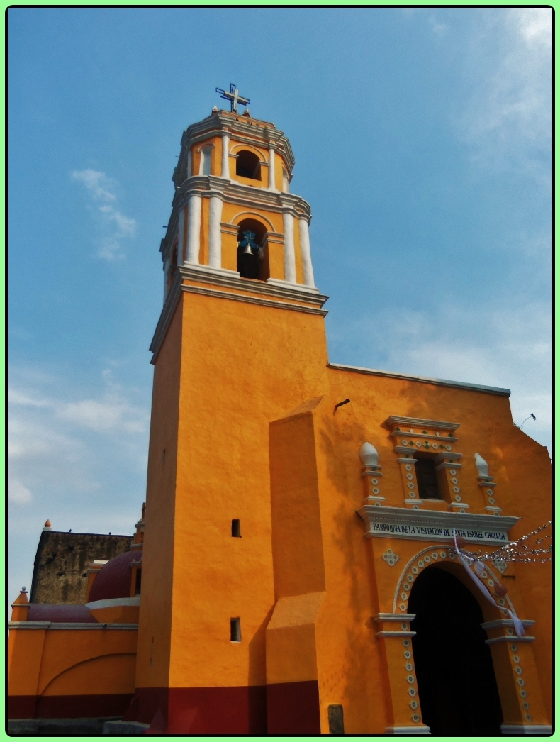 Parroquia de la Visitación de Santa Isabel Cholula ubicada en el municipio de Santa Isabel Cholula, Puebla, México.